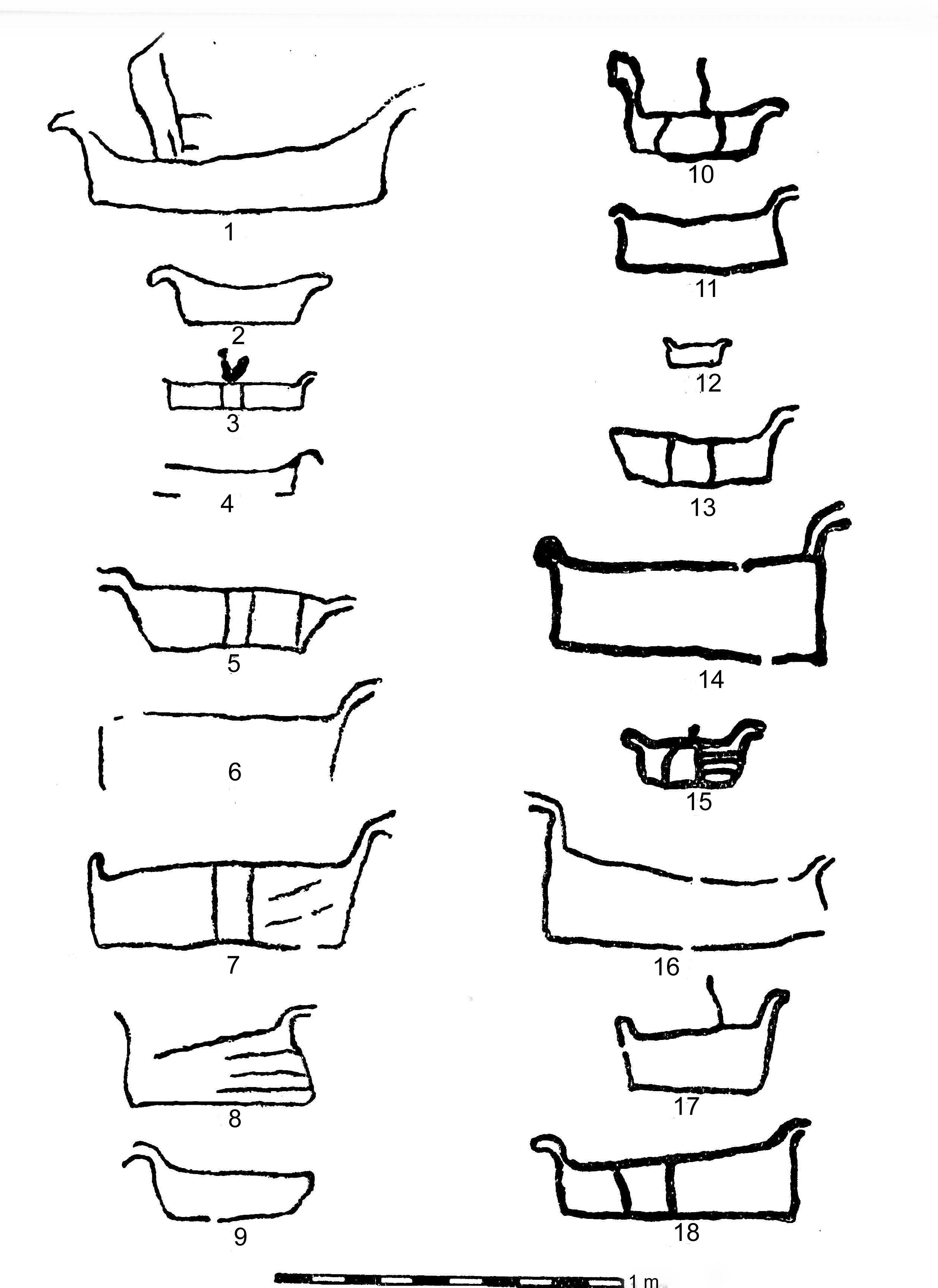 Steinzeitliche Fellboote auf Felsritzungen in Norwegen. Nrn. 1, 2 aus Skjomen, 3, 4 von Rødøy und 5–18 von Evenhus, Frosta.